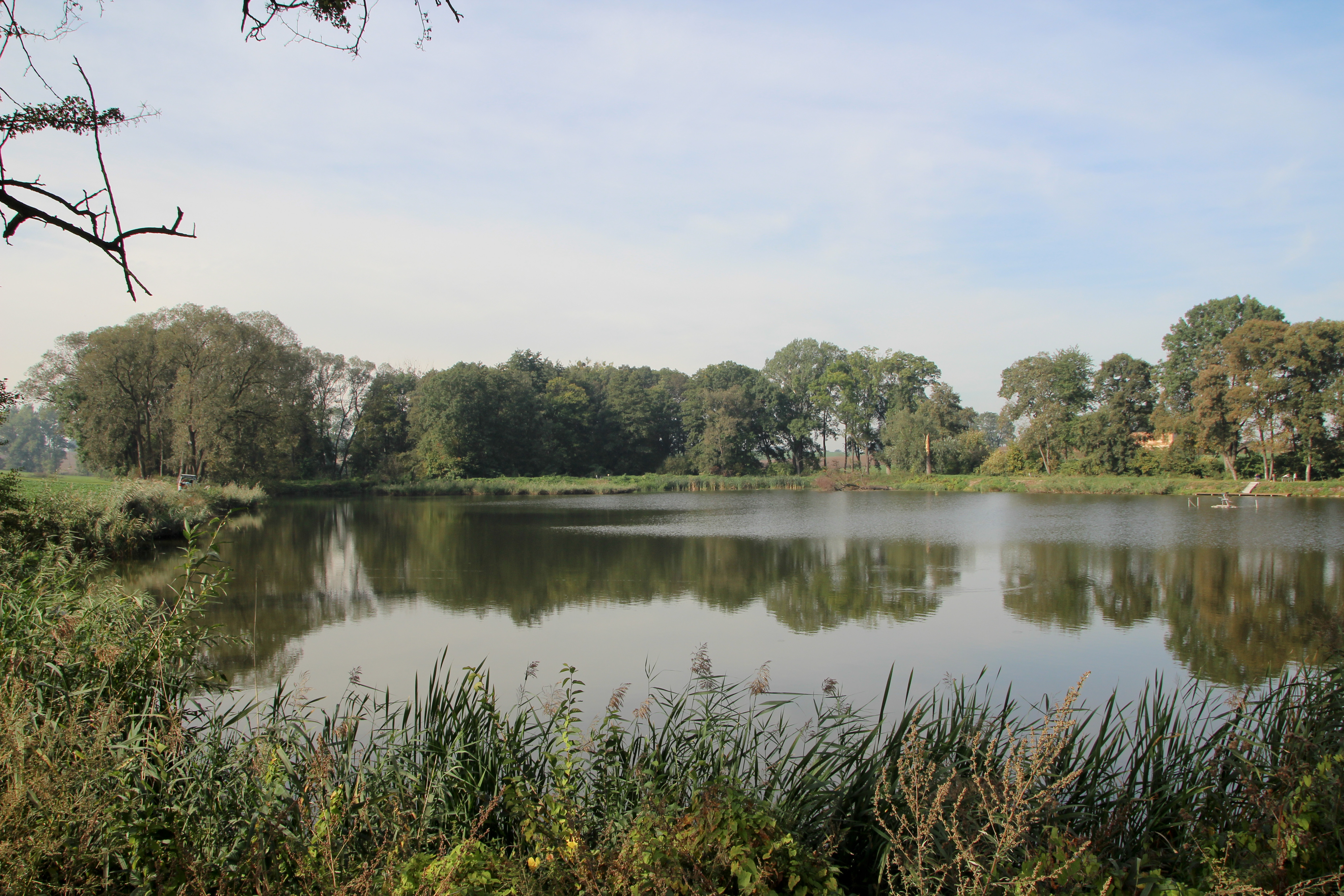 Połowa (w j. niem. Puhlau) – wieś w Polsce położona w województwie opolskim, w powiecie kędzierzyńsko-kozielskim, w gminie Polska Cerekiew.